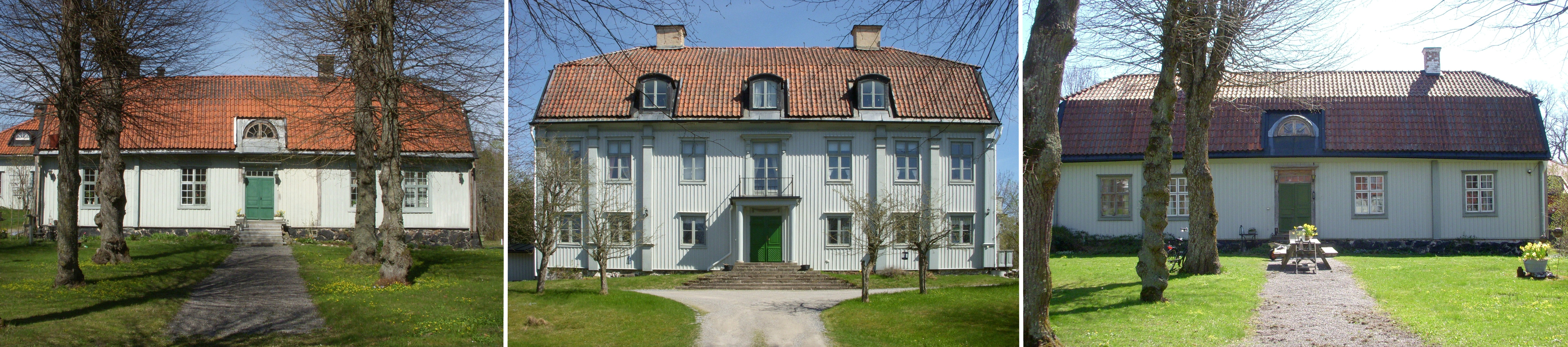 Balingsta gård huvudbyggnad och flyglar